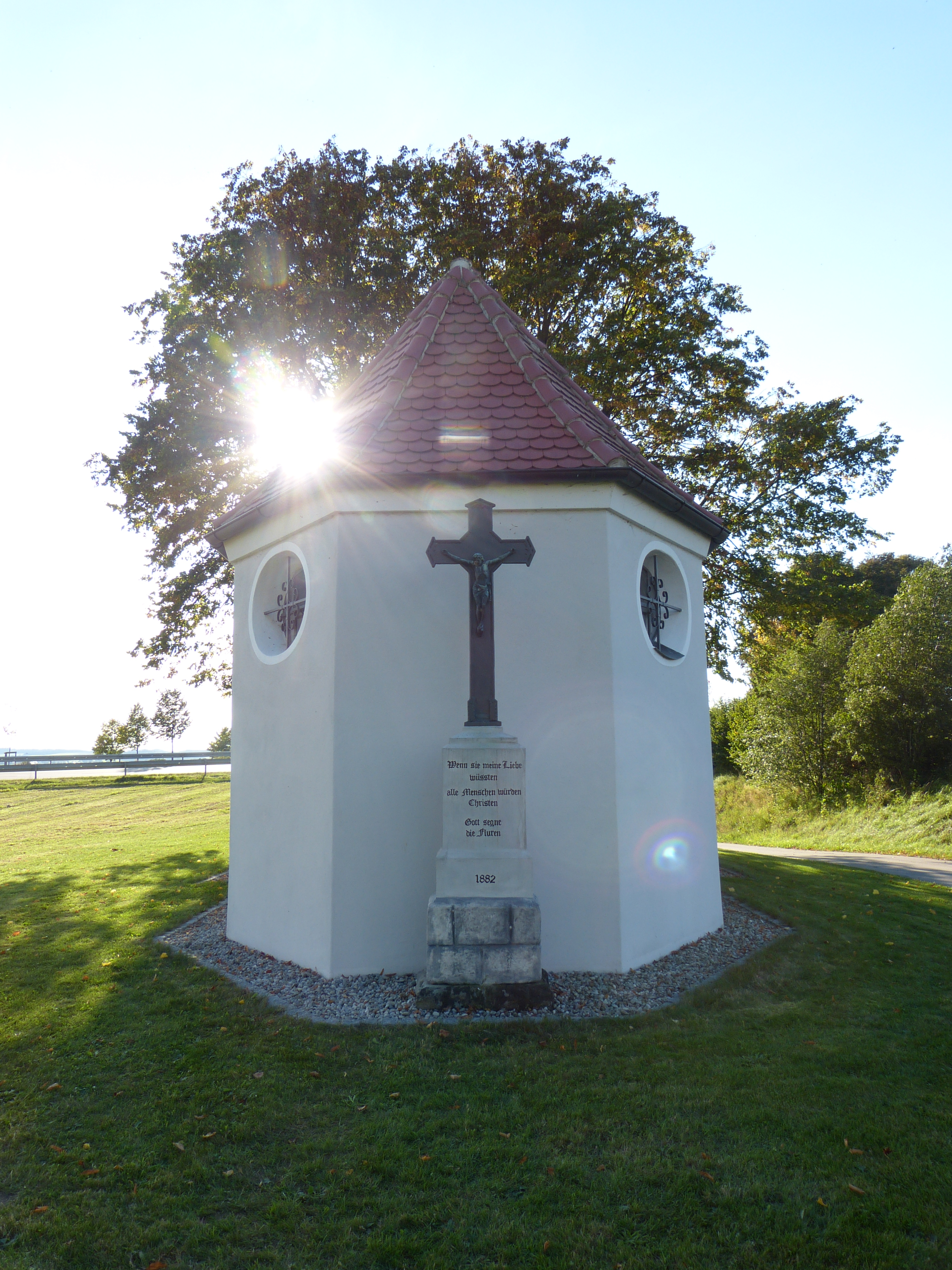 St. Wendelin in Schöneberg, Landkreis Unterallgäu, Bayern